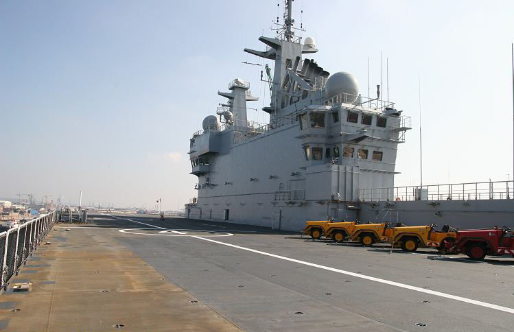 Le pont d'envol du Bâtiment de Projection et de Commandement (BPC) Mistral dans le port de sa future ville marraine Le Havre (4 octobre 2007).